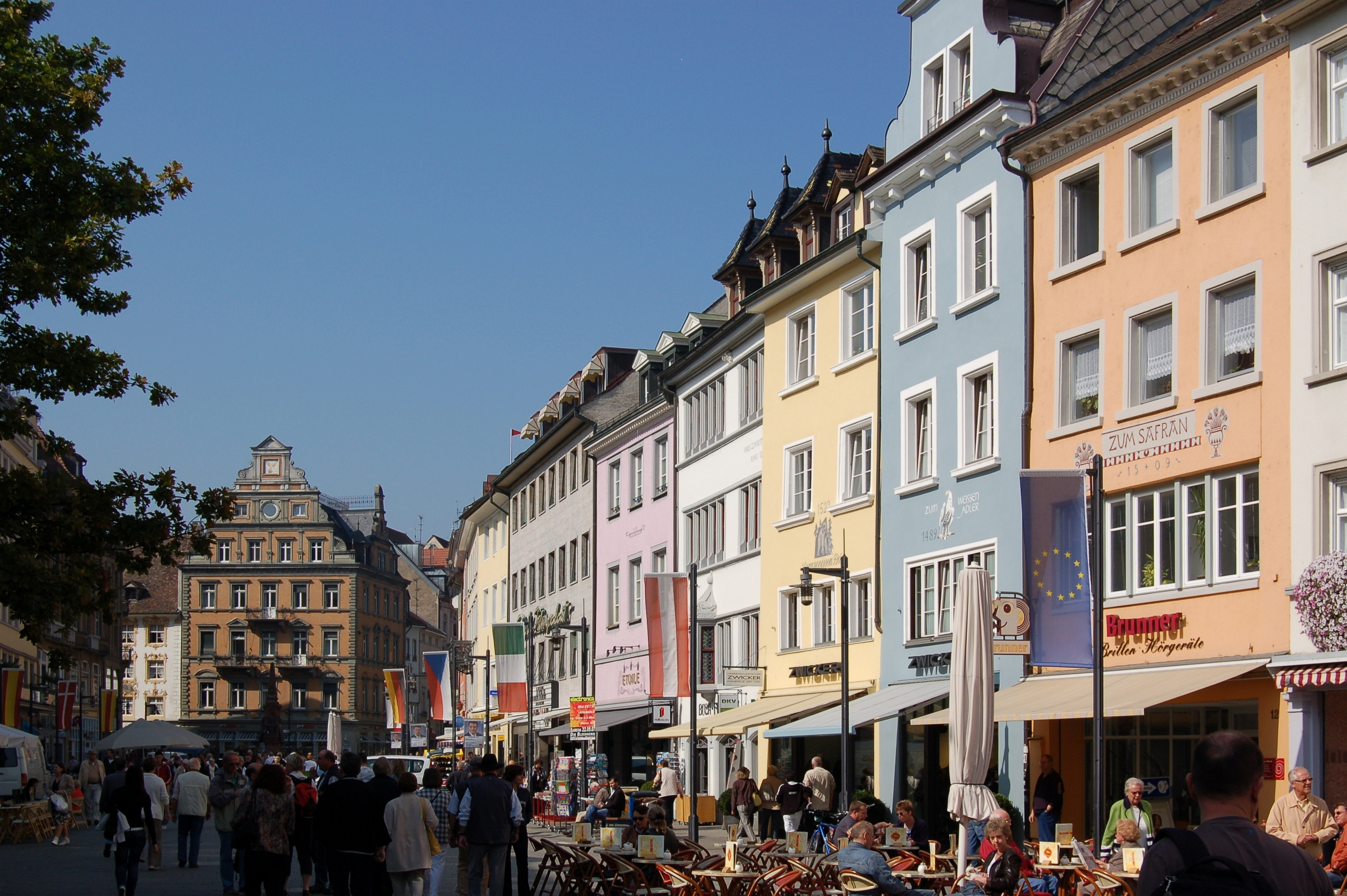 Die Marktstätte, eine heutige Fußgängerzone, die vom Bahnhof bzw. Hafen (Schiffsanleger) Richtung Altstadt führt.